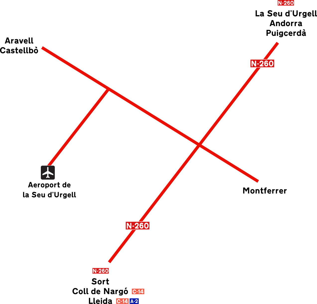 Mapa esquemático de accesos al Aeropuerto de Pirineos-Andorra (en catalán)